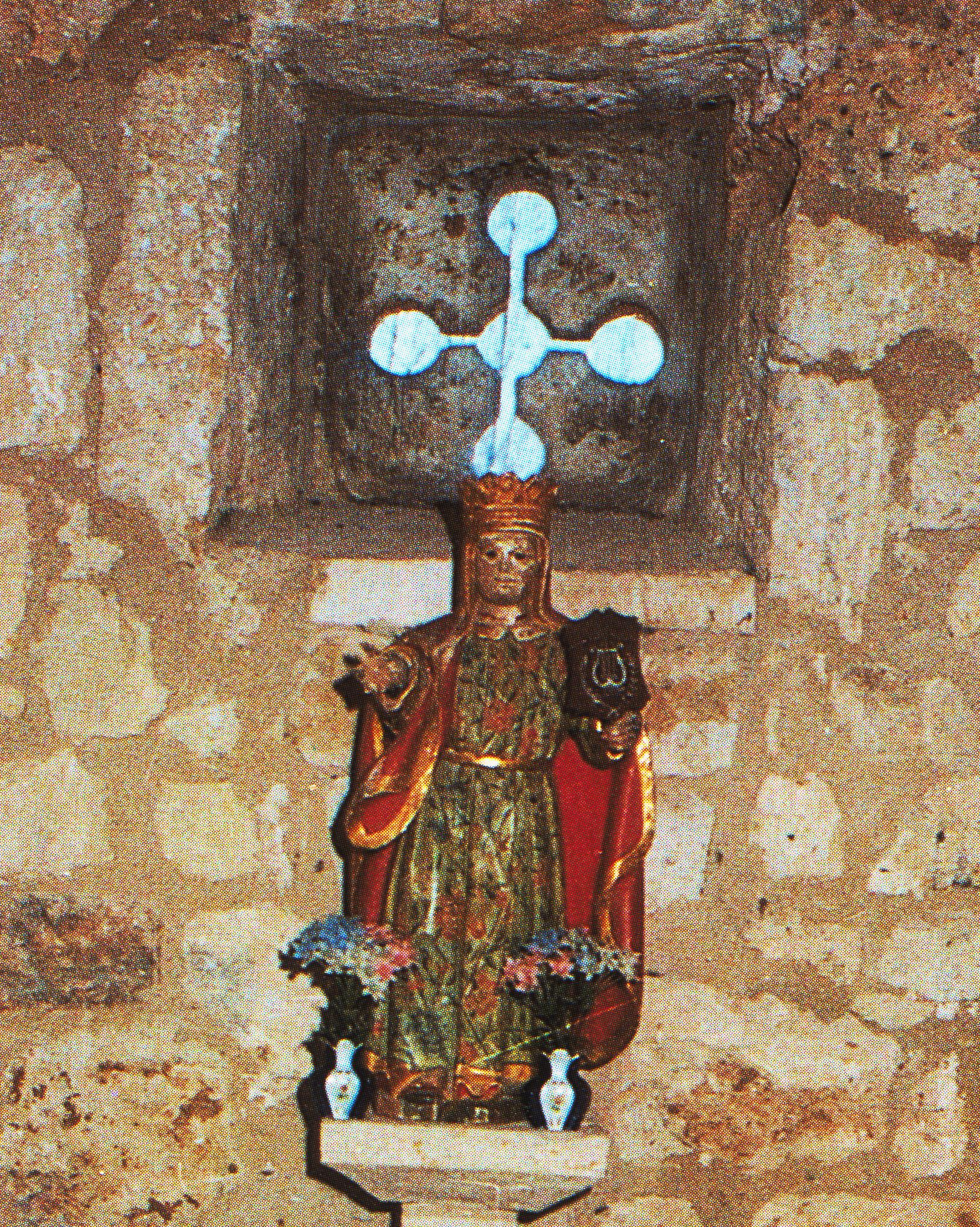 imagen de Santa Cecilia, Barriosuso(Burgos)